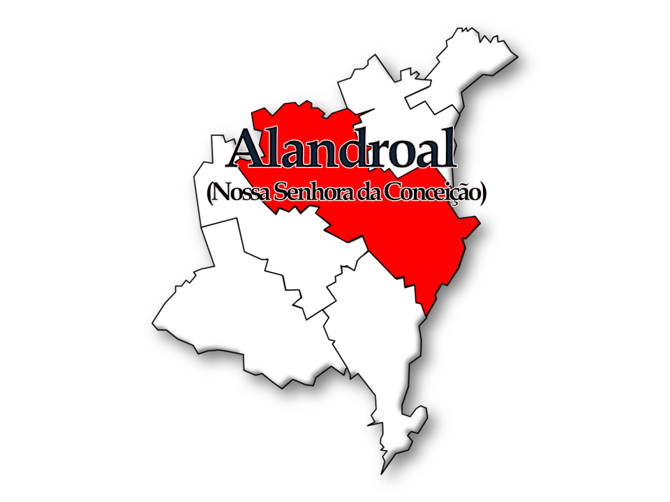 Censos 1864/2011